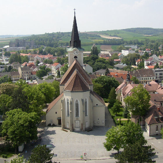 Hollabrunn, Lower Austria